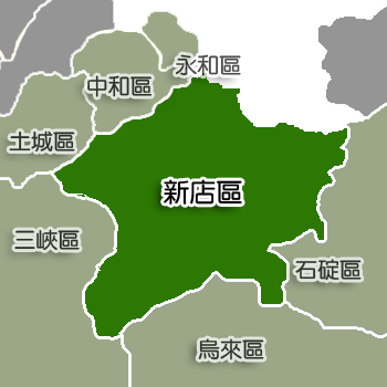 新店區相對位置